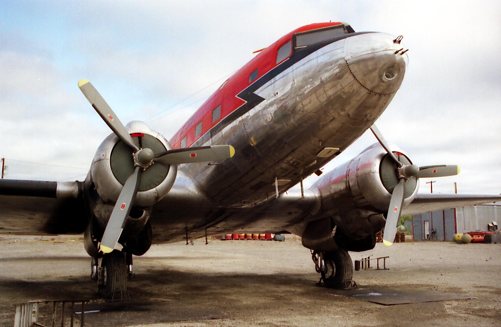 DC-3S of Kenn Borek taken at Inuvik NWT